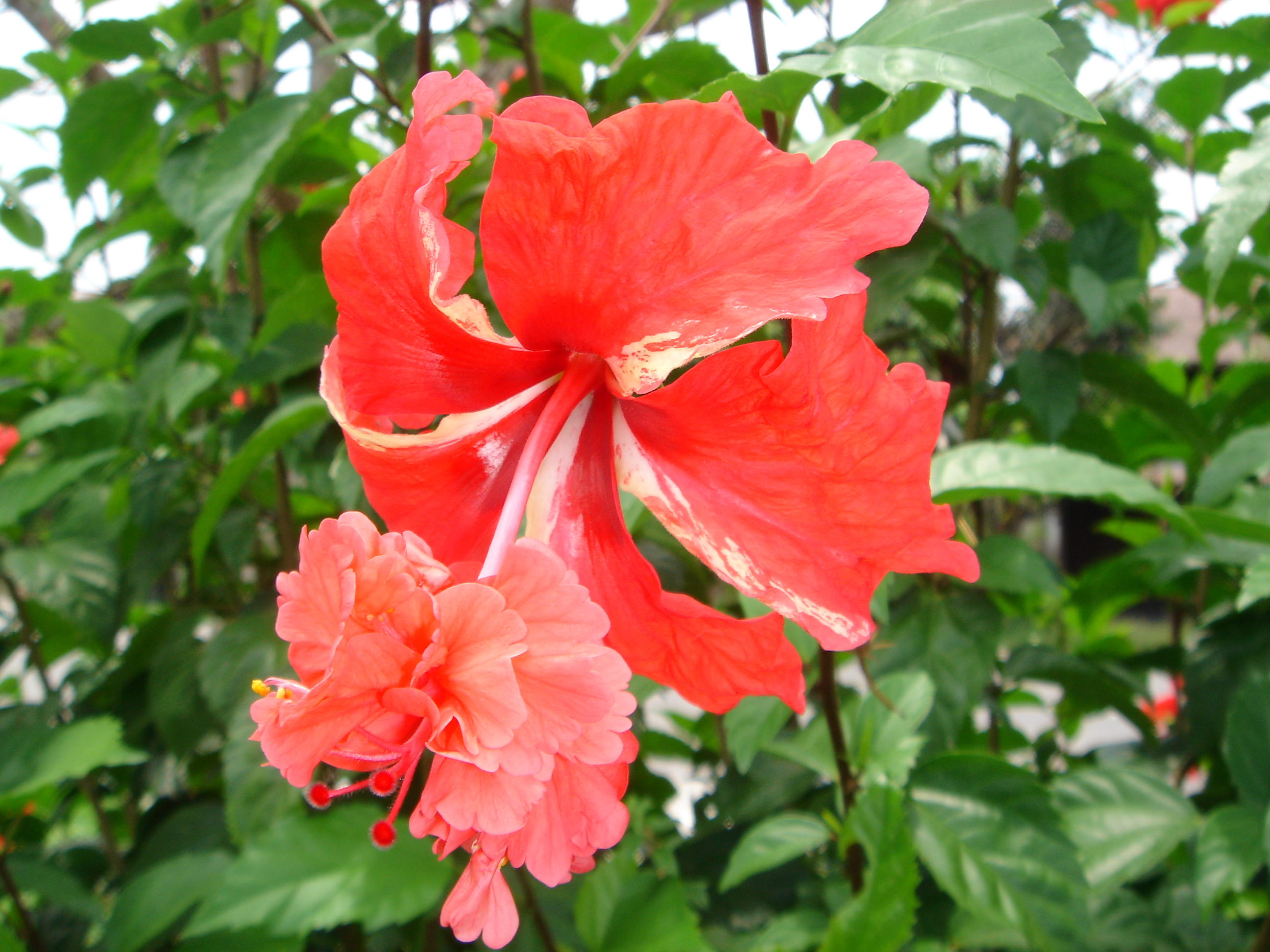 Hibiscus rosa-sinensis: Hibiscus Cultivar 'El Capitolio'